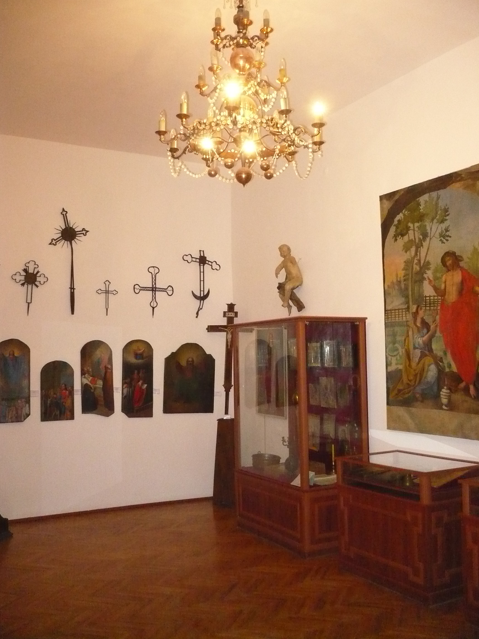 Zbaraż, sala zamku